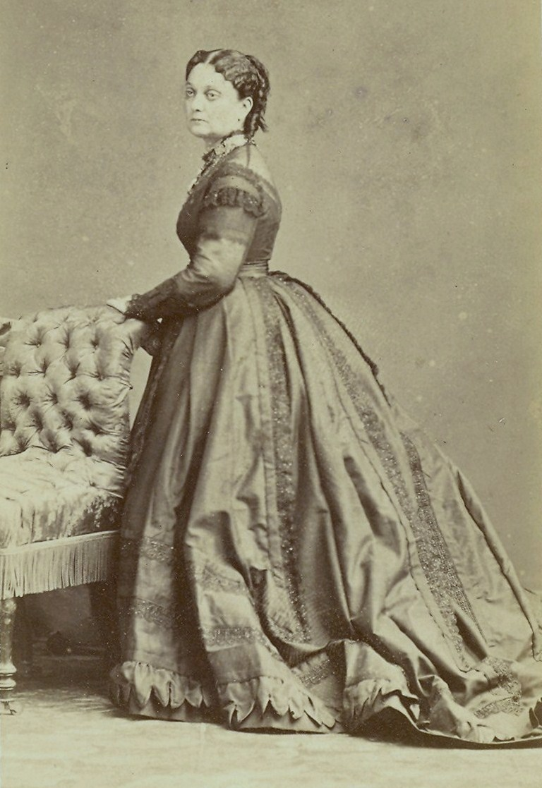 Княгиня Анастасия Давидовна Гагарина, ур. Орбелиани (1825—1907)